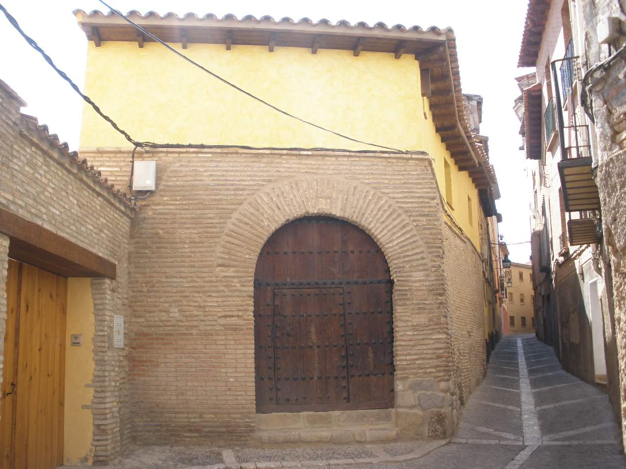 Tarazona (Zaragoza)